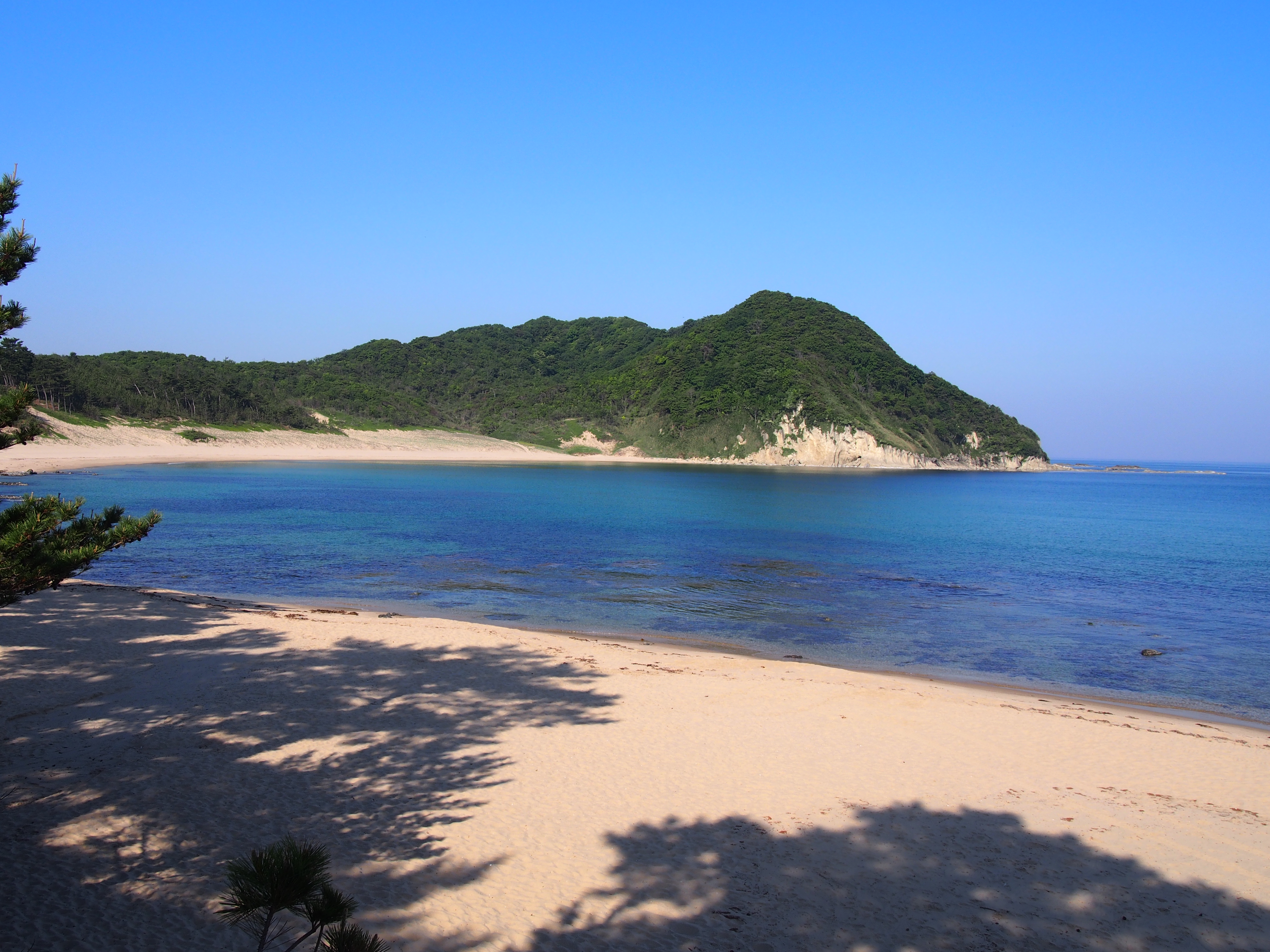 京都府京丹後市網野町掛津の琴引浜。浜の西側。